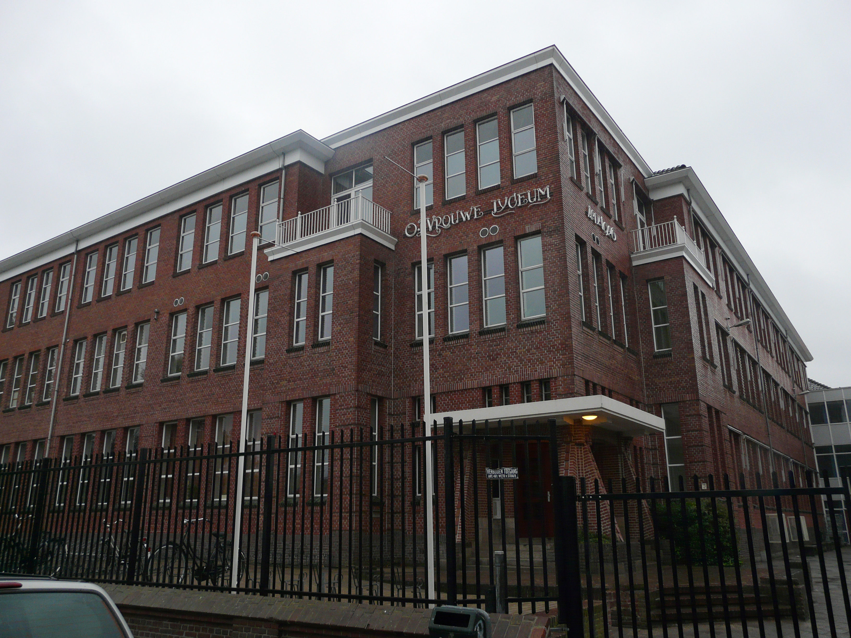 Zicht op een deel van het Onze Lieve Vrouwelyceum in Breda